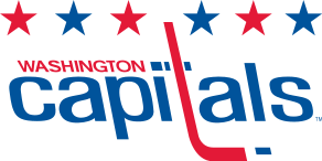 Logotipo do Washington Capitals entre 1974-1995.